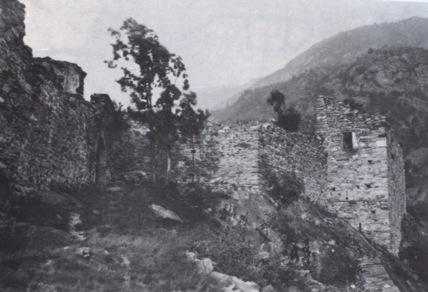 Ingresso a sud del Castello di Pont-Saint-Martin detto Castellaccio, Pont-Saint-Martin, Valle d'Aosta, Italia.